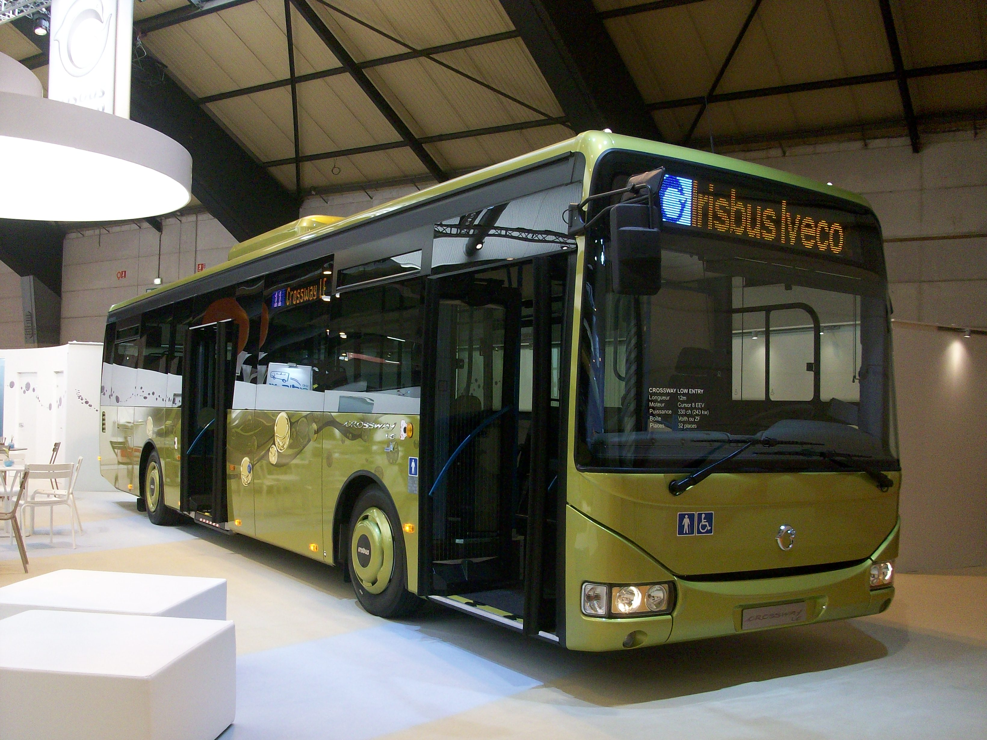 Irisbus Crossway LE exposé aux 23e RNTP, Strasbourg